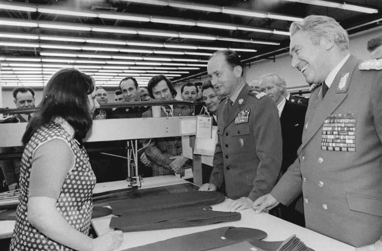 Cottbus, Wojciech Jaruzelski, Heinz Hoffmann mit Gastarbeiterin ADN-ZB Spermberg 11.3.75 Cottbus- Die Millitärdelegation der VR Polen unter Leitung des Mitglieds des Politbüros des ZK der PVAP und Ministers für nationale Verteidigung, Armeegeneral Wojciech Jaruzelski (2. v. r.) besuchte am 11.3.75 den Stammbetrieb des VEB Textilkombinat Cottbus. Sie wurden begleitet vom Mitglied des Politbüro des ZK der SED und Minister für nationale Verteidigung der DDR, Armeegeneral Heinz Hoffmann (r). In der Konfektionsabteilung kam es zum herzlichen Gespräch mit der polnischen Automatennäherin Danuta Syta. siehe dazu auch ADN-Meldung v. 11.3.75